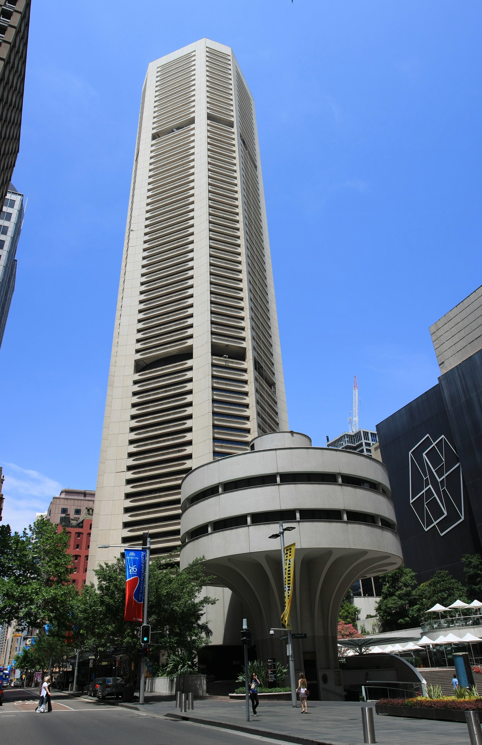 MLC center sydney